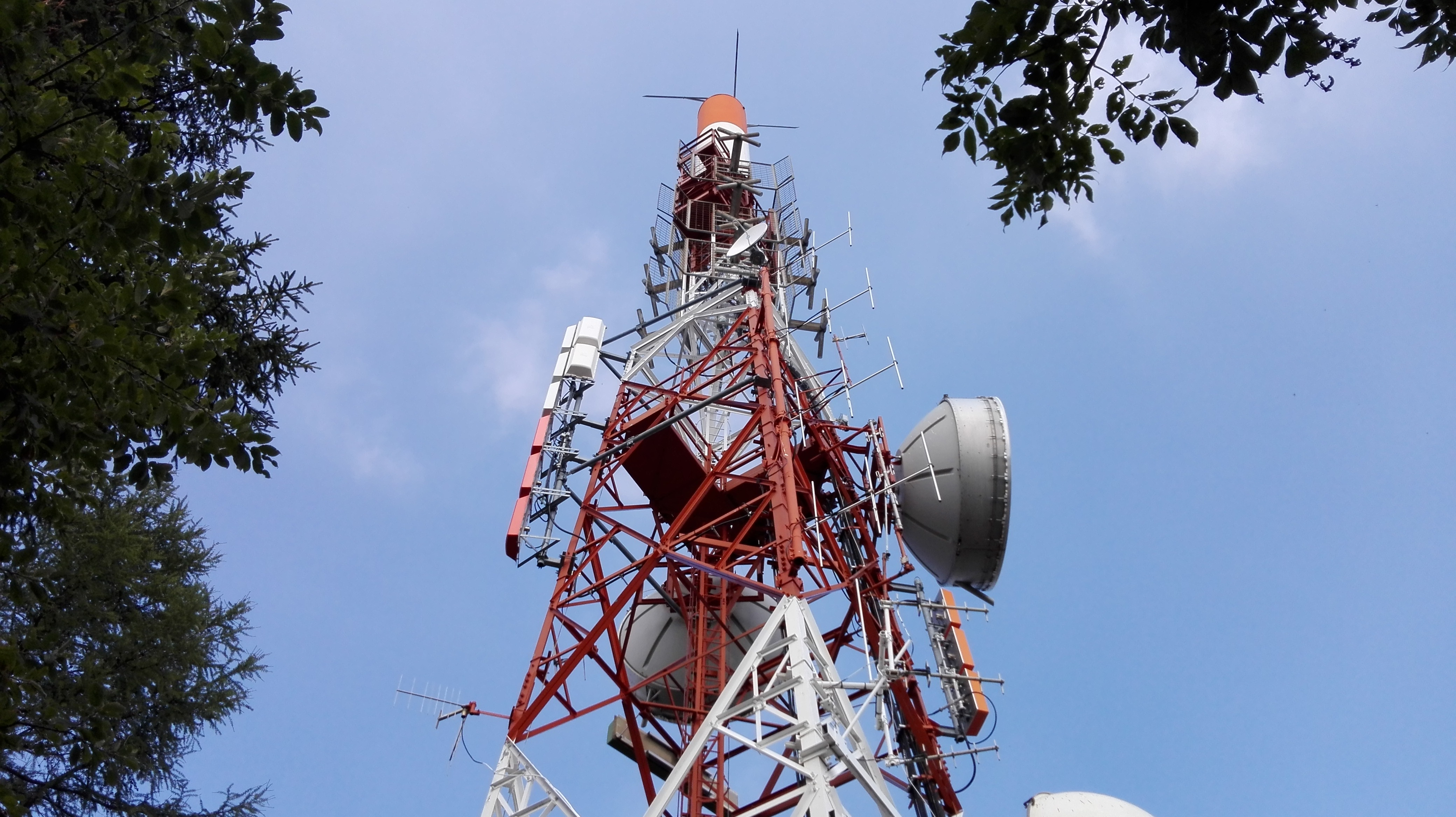 Postazione trasmittente di Raiway situata sulla Punta di Mezzo